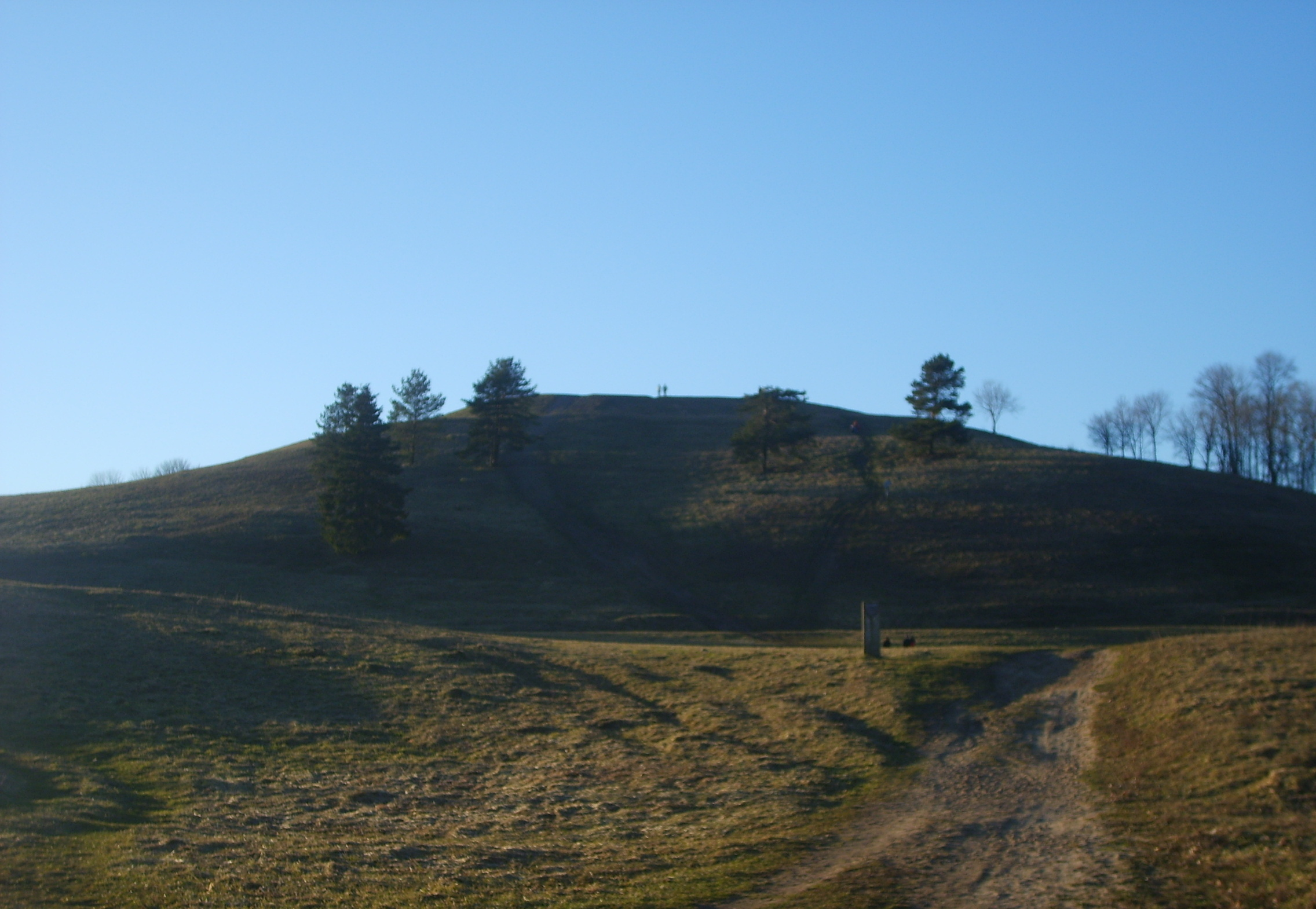 Šatrijos piliakalnis